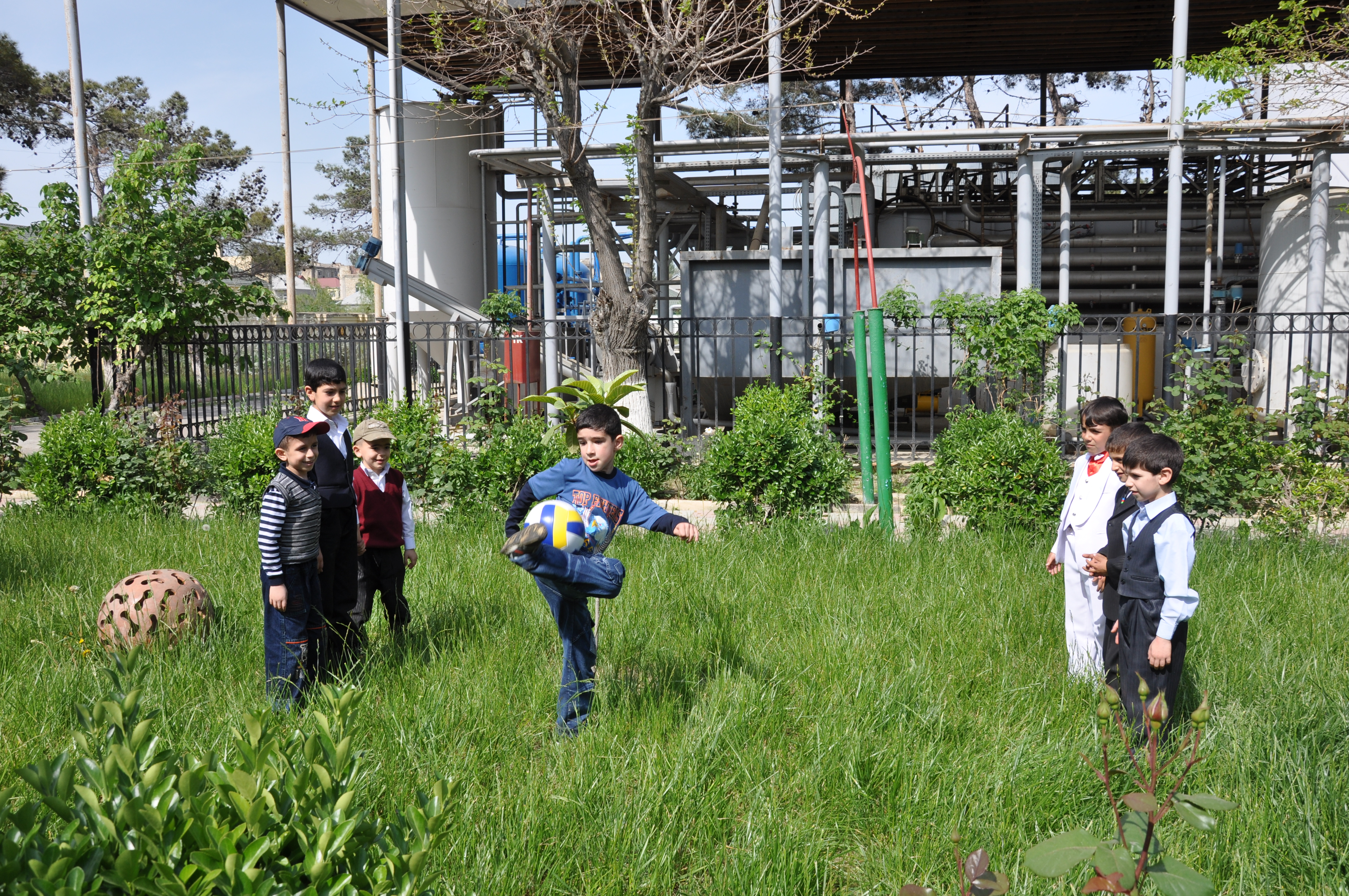 Çiləmə — Azərbaycanda ən çox yazqabağı (bayramqabağı) günlərdə, eləcə də digər fəsillərdə əsasən uşaq və gənclər arasında geniş şəkildə oynanılan qədim uşaq oyunlarından biridir.